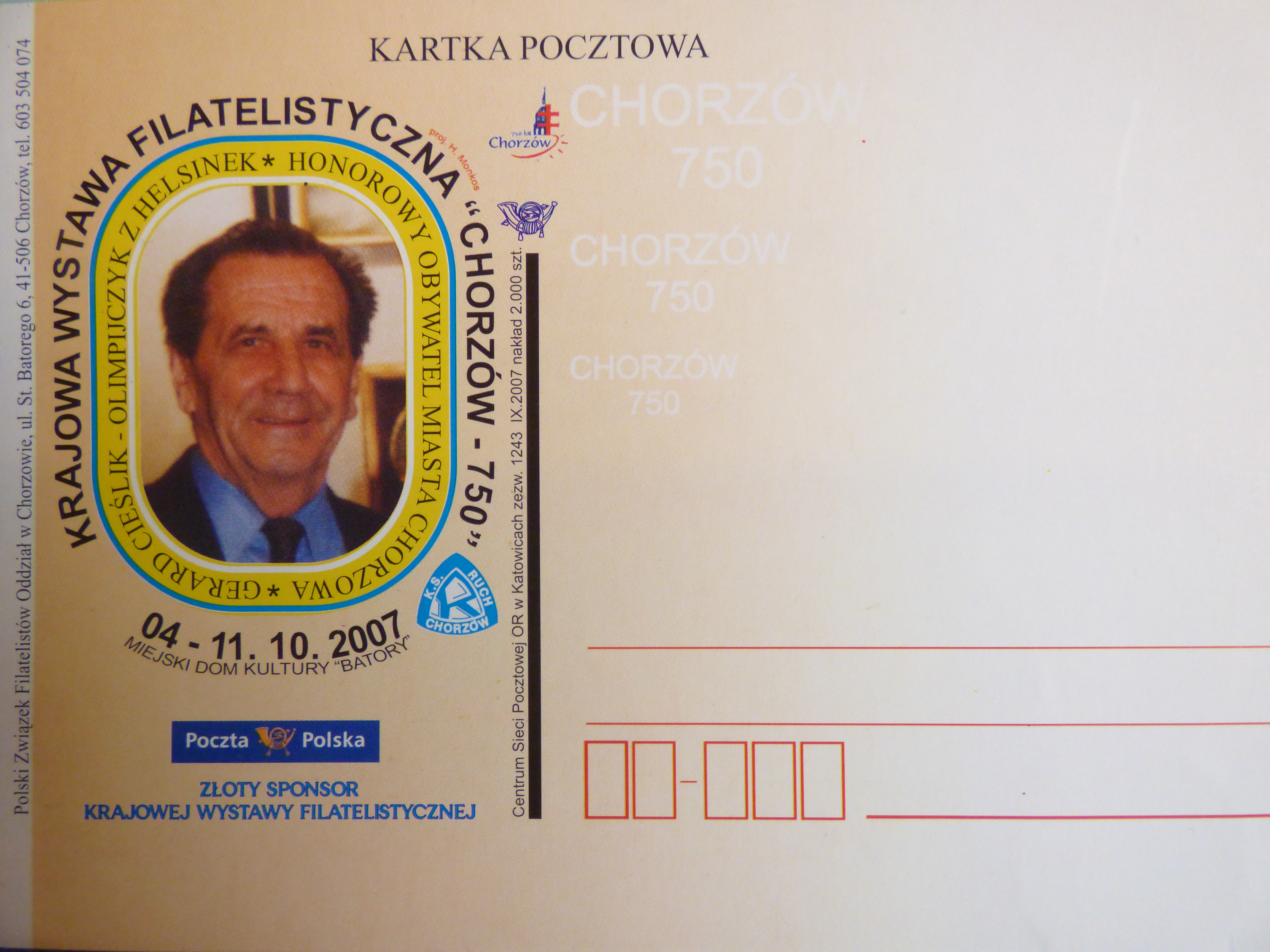 Kartka pocztowa z wizerunkiem Gerarda Cieślika z okazji KWF - "Chorzów-750"